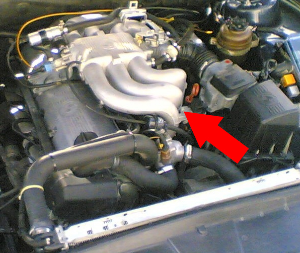 Kleinerer Ausschnitt mit Pfeil eines Bildes des Motorraumes eines E28